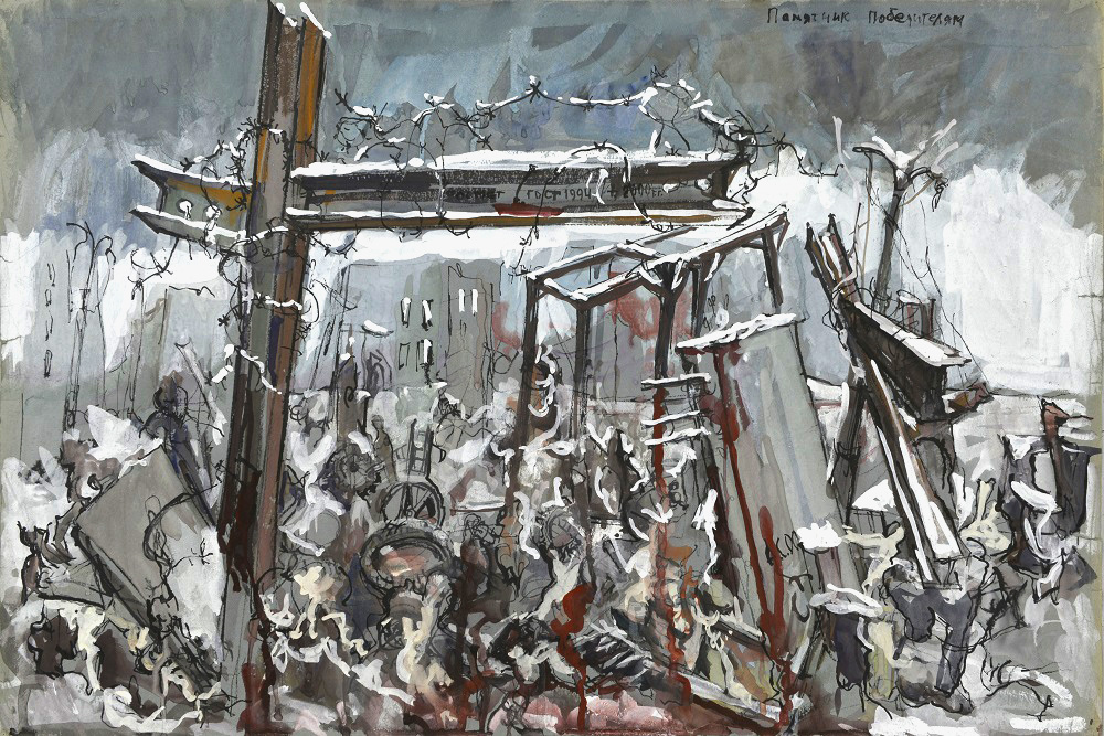 «Памятник победителям» из серии «Апокалипсис». Бумага, акварель, белила